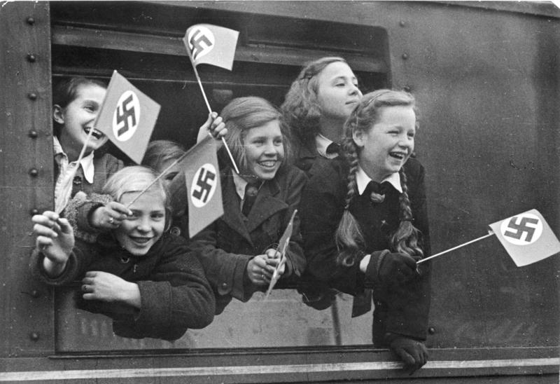 Im Sonderzug fahren die Kinder von Berlin ab Täglich finden neue Kindertransporte aus allen Bevölkerungsschichten der Reichshauptstadt im Rahmen der Landverschickung in andere Gaue des Reiches statt.